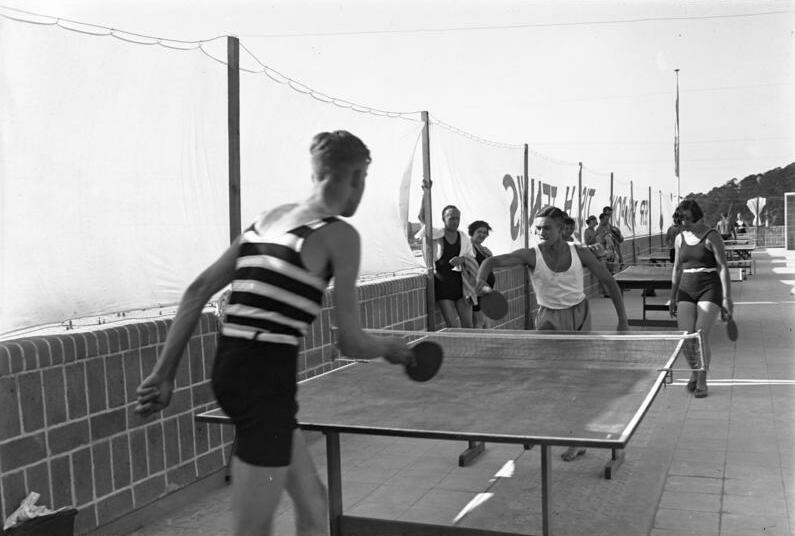 Interessante Aufnahmen aus dem schönsten und größten Strandbad Wannsee b/Berlin! Hunderttausende von Berlinern suchen hier täglich bei der grossen Hitze ihre Erholung. Tisch-Tennis, ein beliebter Sport auf dem Dachgarten des Strandbades Wannsee b/Berlin